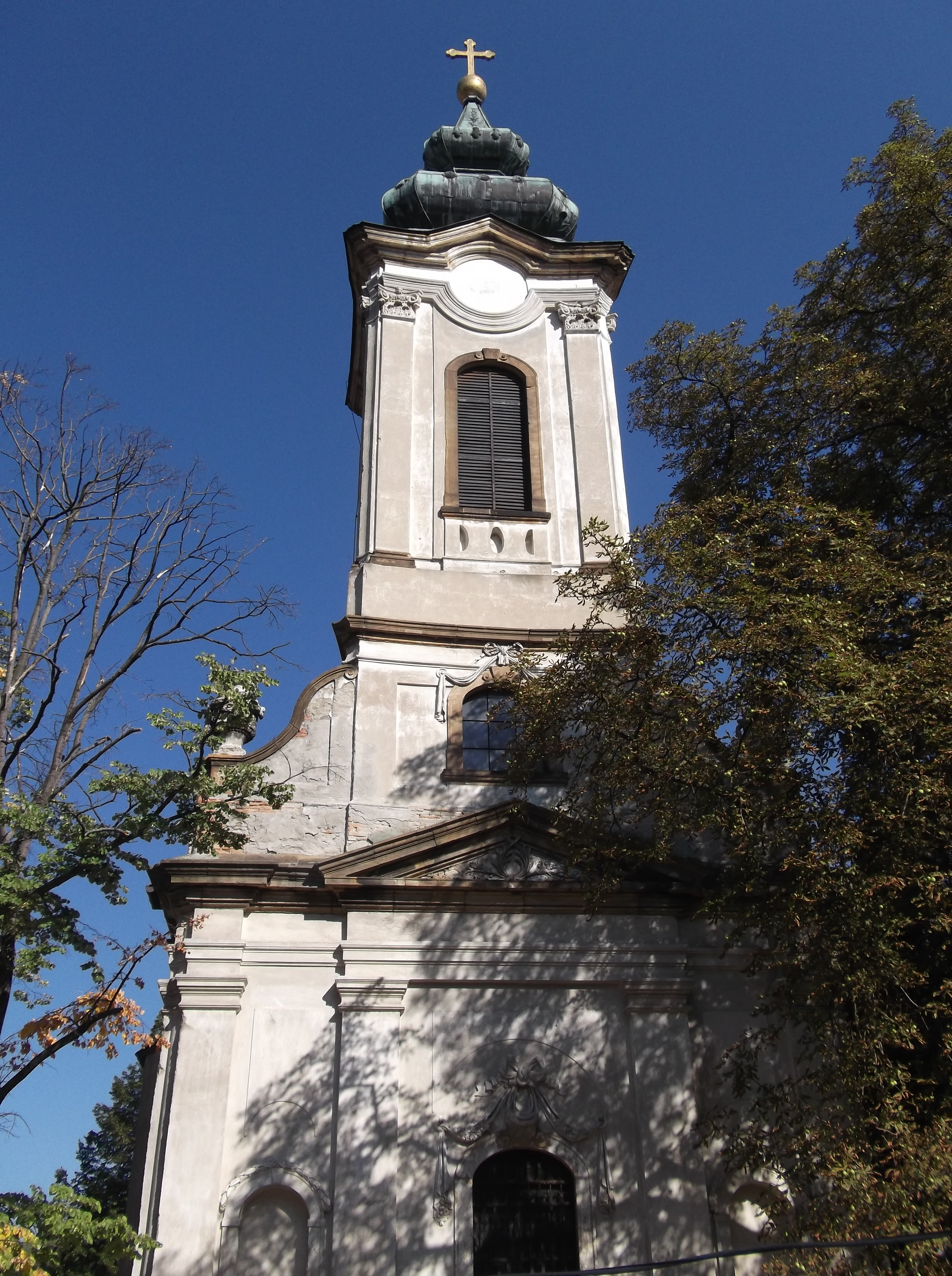 Szentendre, Hungary